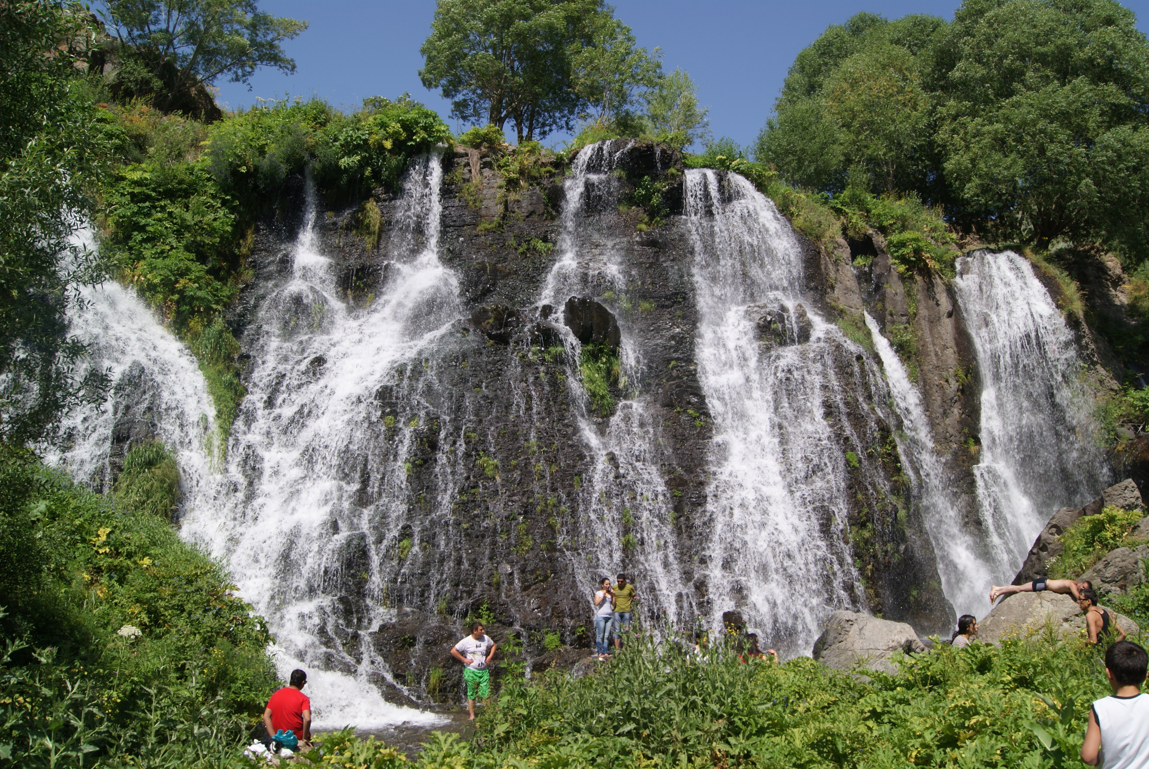 «Շաքի» ջրվեժ